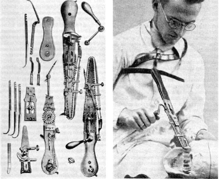 First published here: Vogeler, Redenz, Walter, Martin: Bernhard Heines Versuche über Knochenregeneration, Berlin 1926